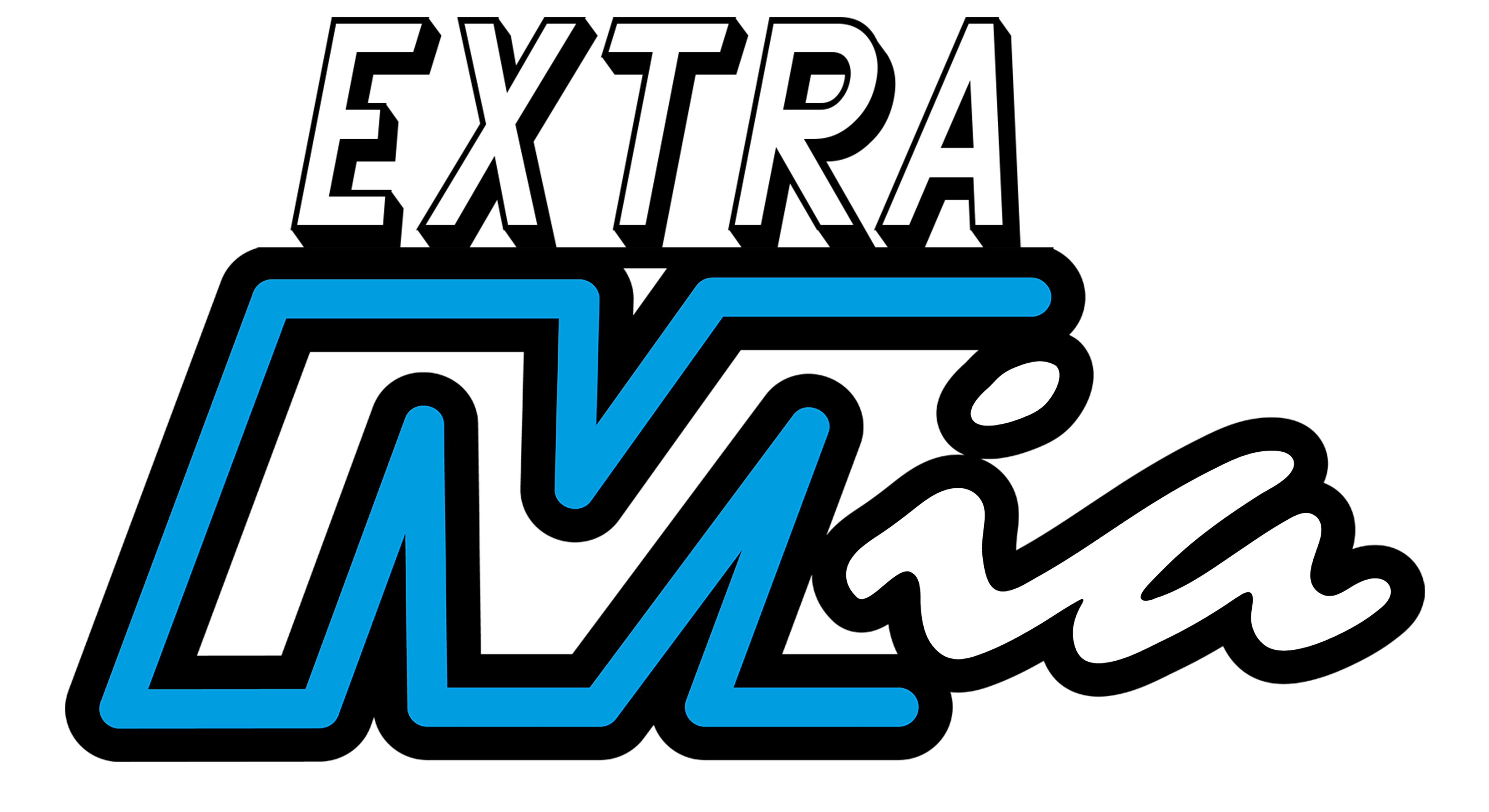 Logo TelemiaExtra